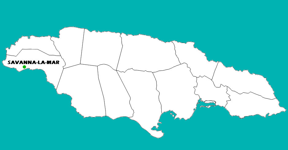 Mapa localizador de Savanna-La-Mar, Jamaica.